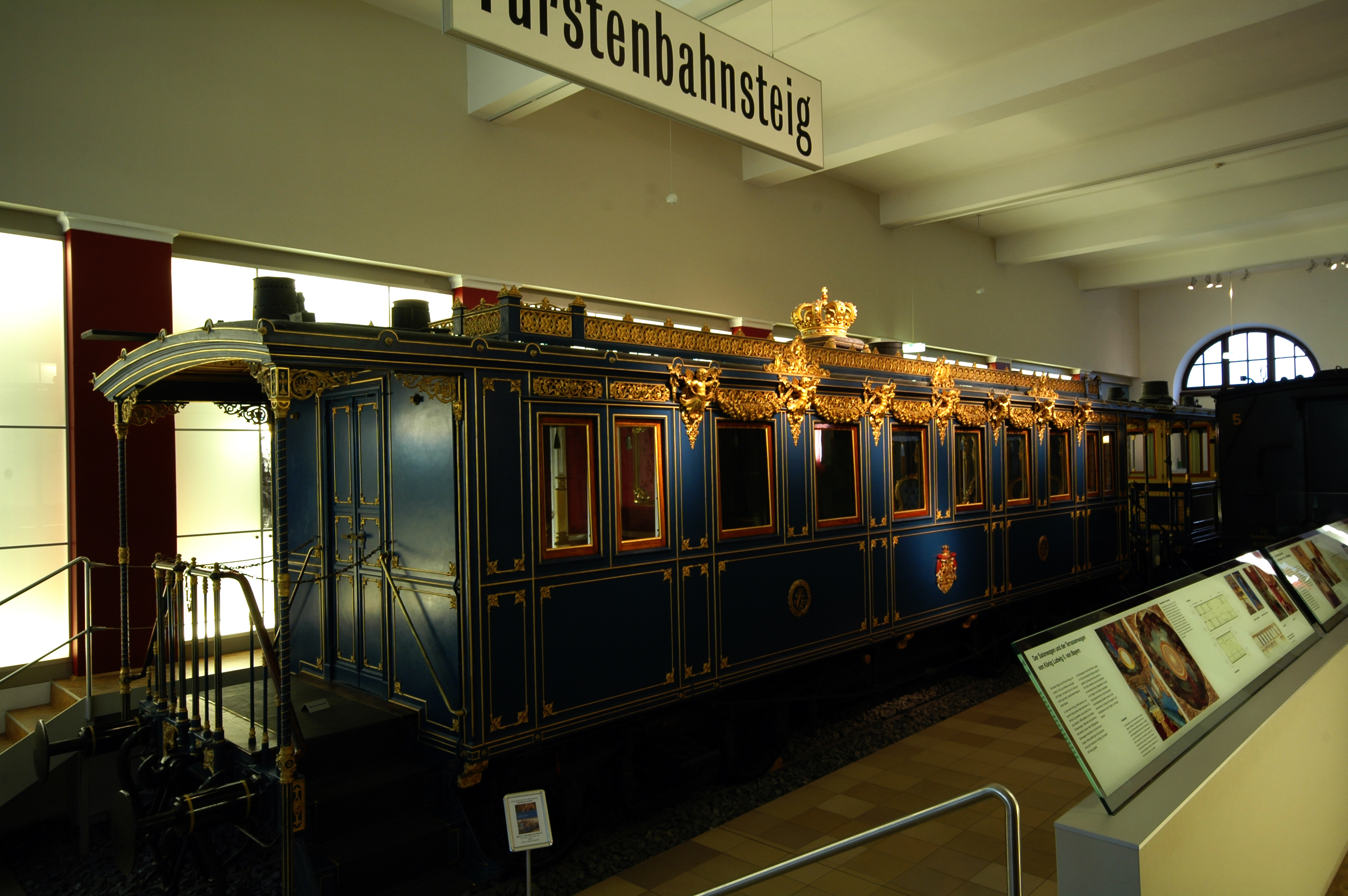 Verkehrsmuseum Nürnberg